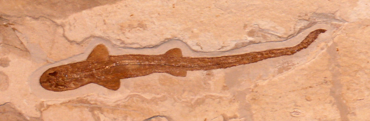 Paratriakis curtirostris, aus der Oberkreide (vor 80 Mill. Jahren ) von Kleinasien und des Libanon, Hakel-Gebirge, Sahel Alma